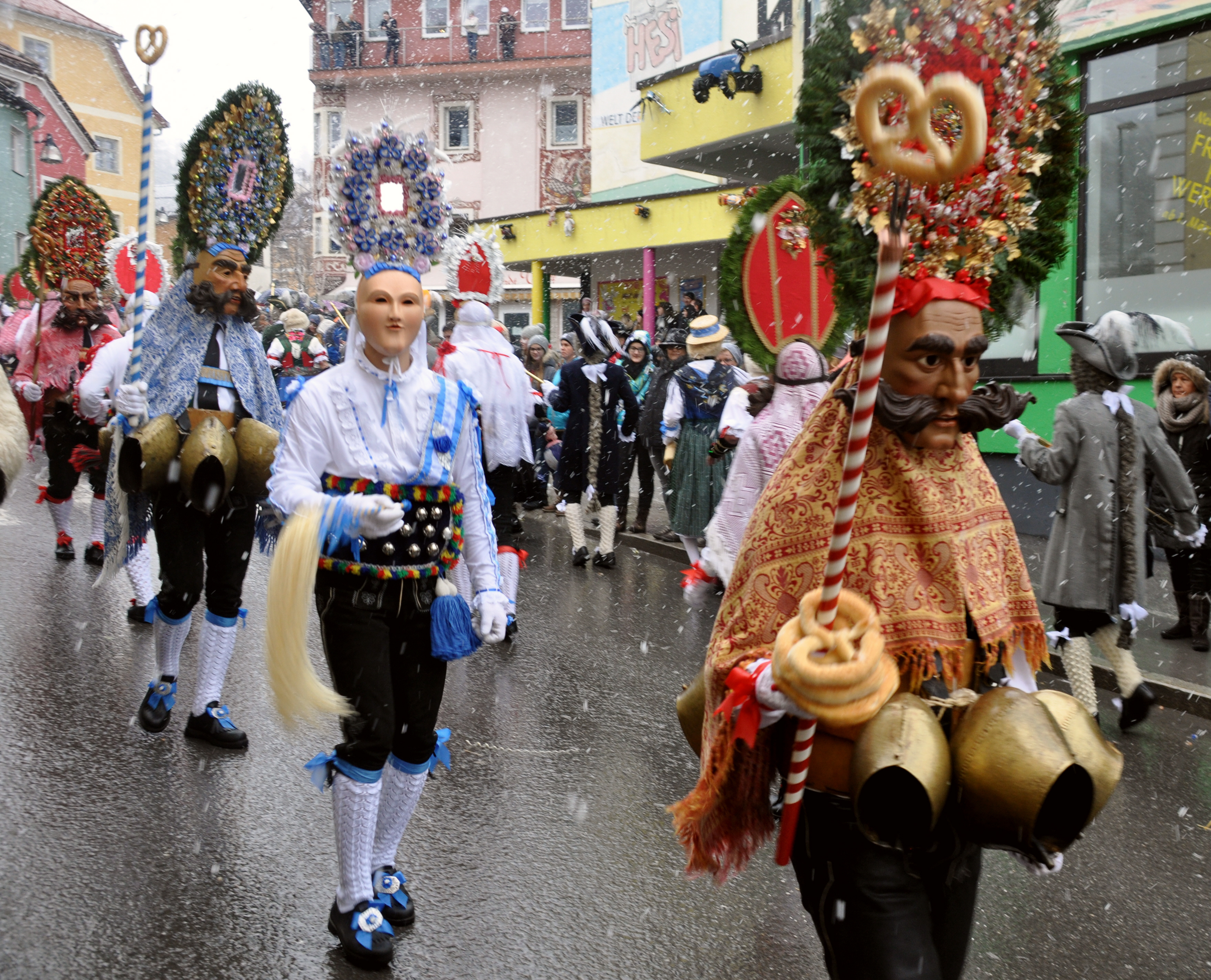 Imst (Tirol), Imster Schemenlaufen 2016, Scheller und Roller